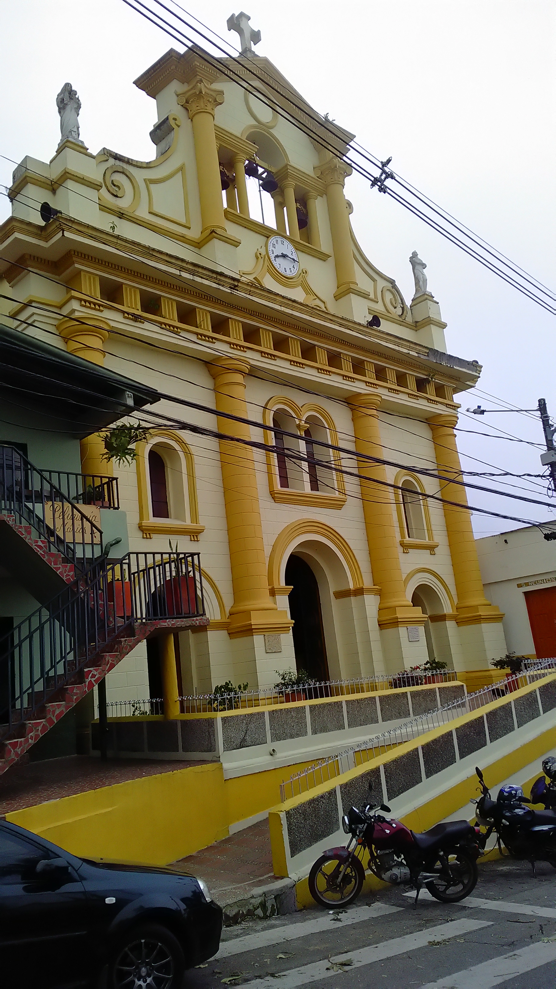 Iglesia del corregimiento de Palmitas, en la ciudad de Medellín.